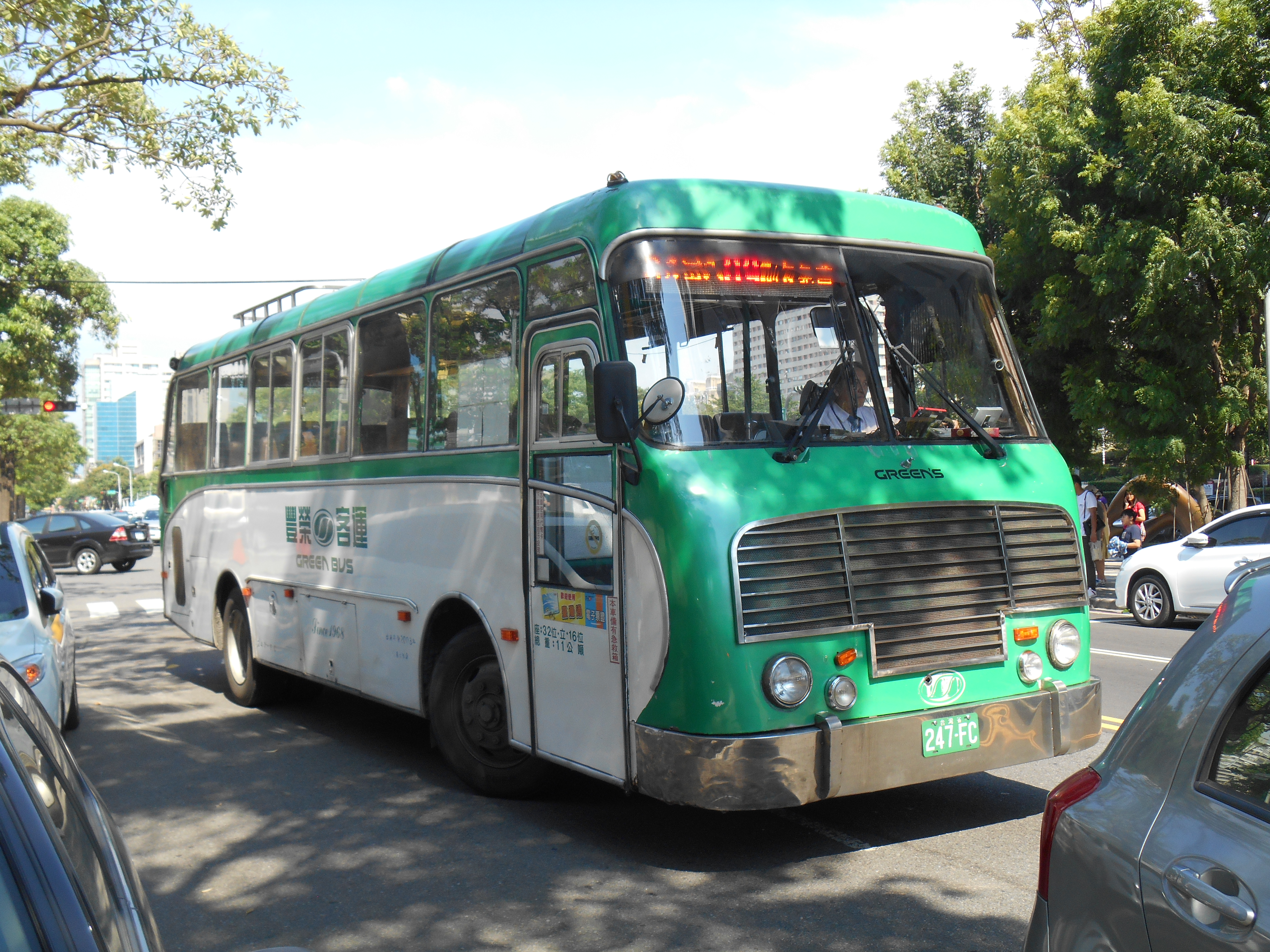 豐榮客運2003年復古巴士247-FC營運台中市公車89路